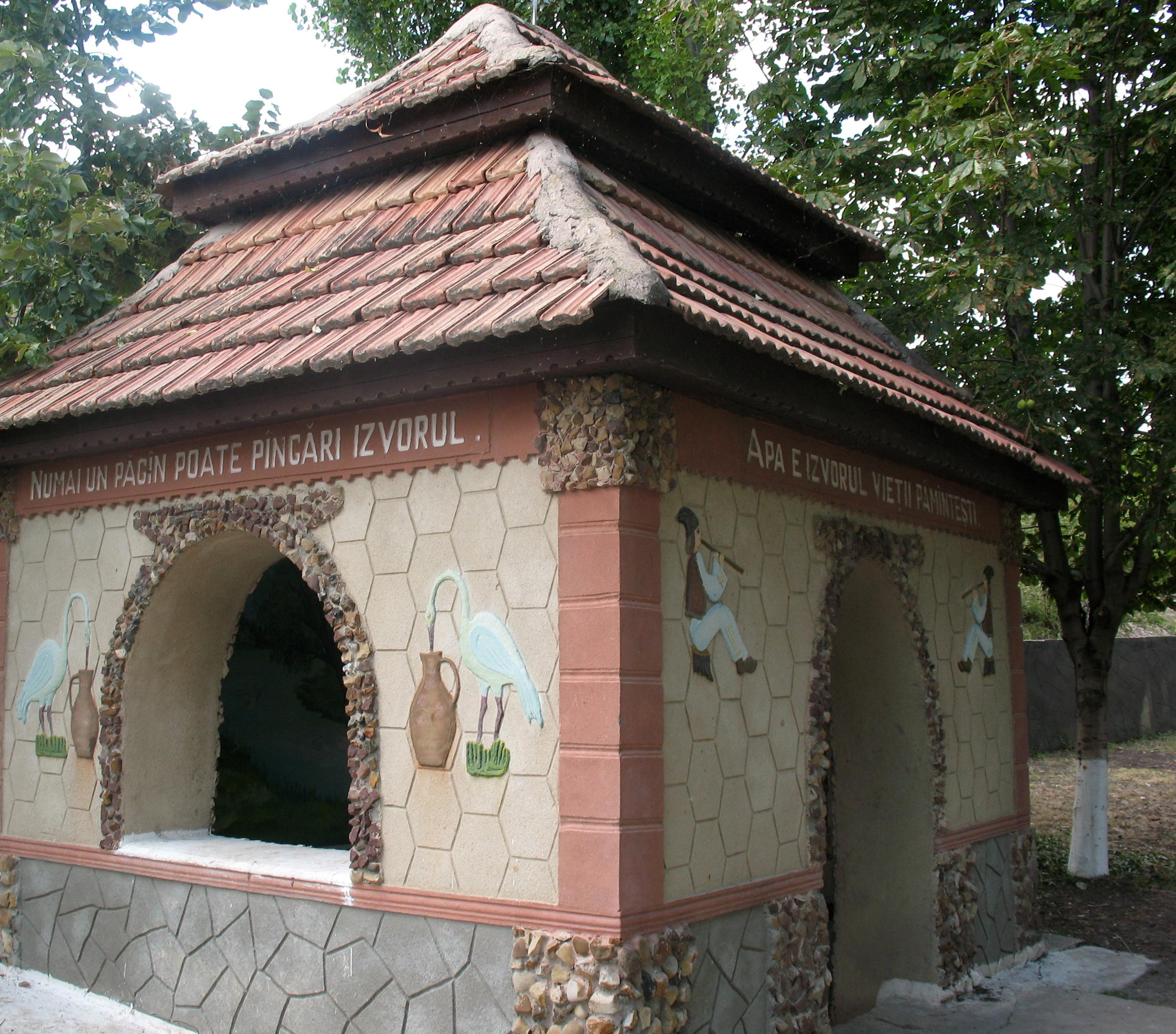 "Izvorul din stâncă" din satul Molovata